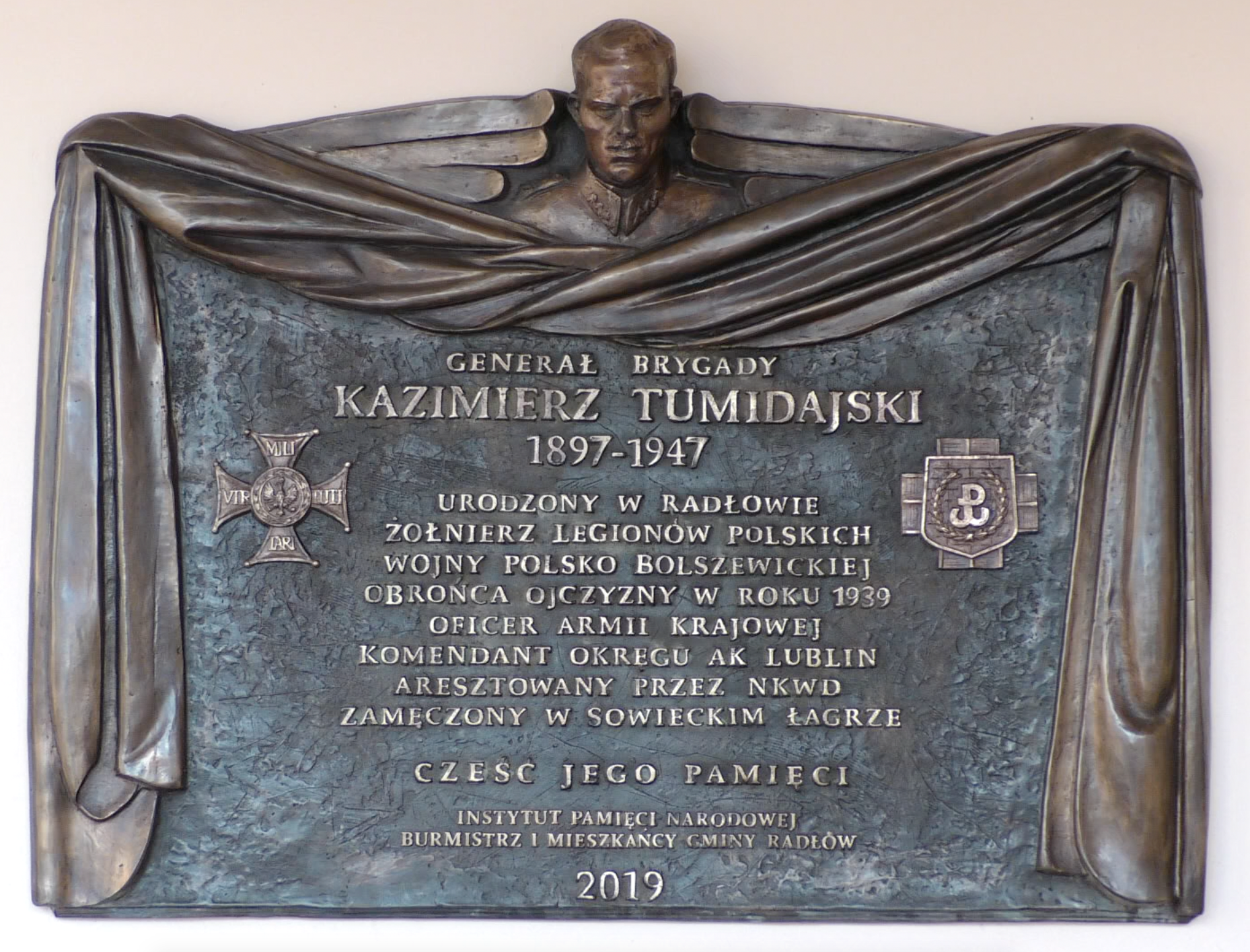 Tablica poświęcona pamięci gen. Kazimierza Tumidajskiego , umieszczona na budynku Urzędu Miasta Radłowa 1 września 2019 roku